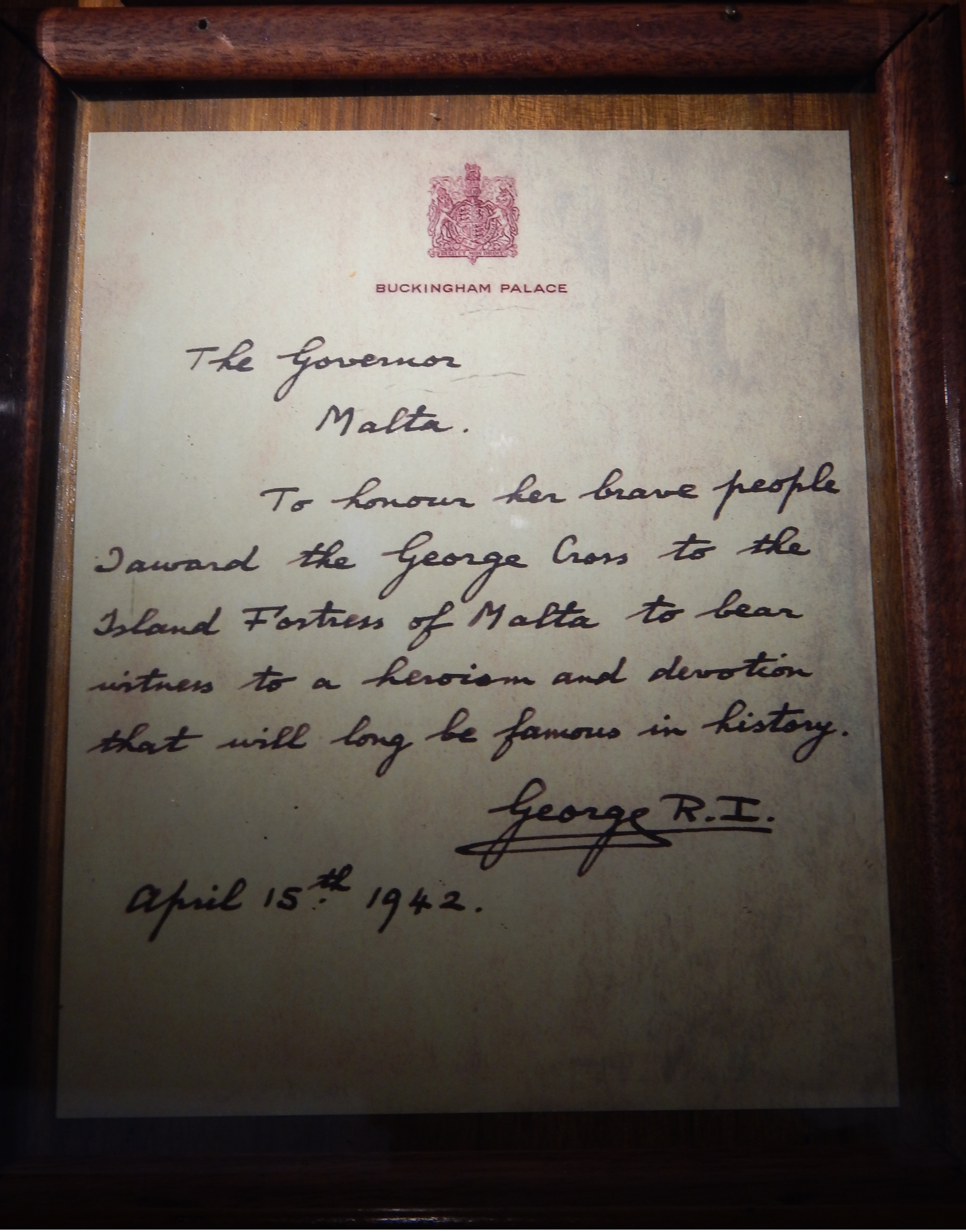 Courrier officiel accompagnant la croix de Georges reçue par le gouverneur de Malte le 15 avril 1942. Celle-ci figure sur le drapeau.du pays et est exposée au fort Saint-Elme à La Valette.